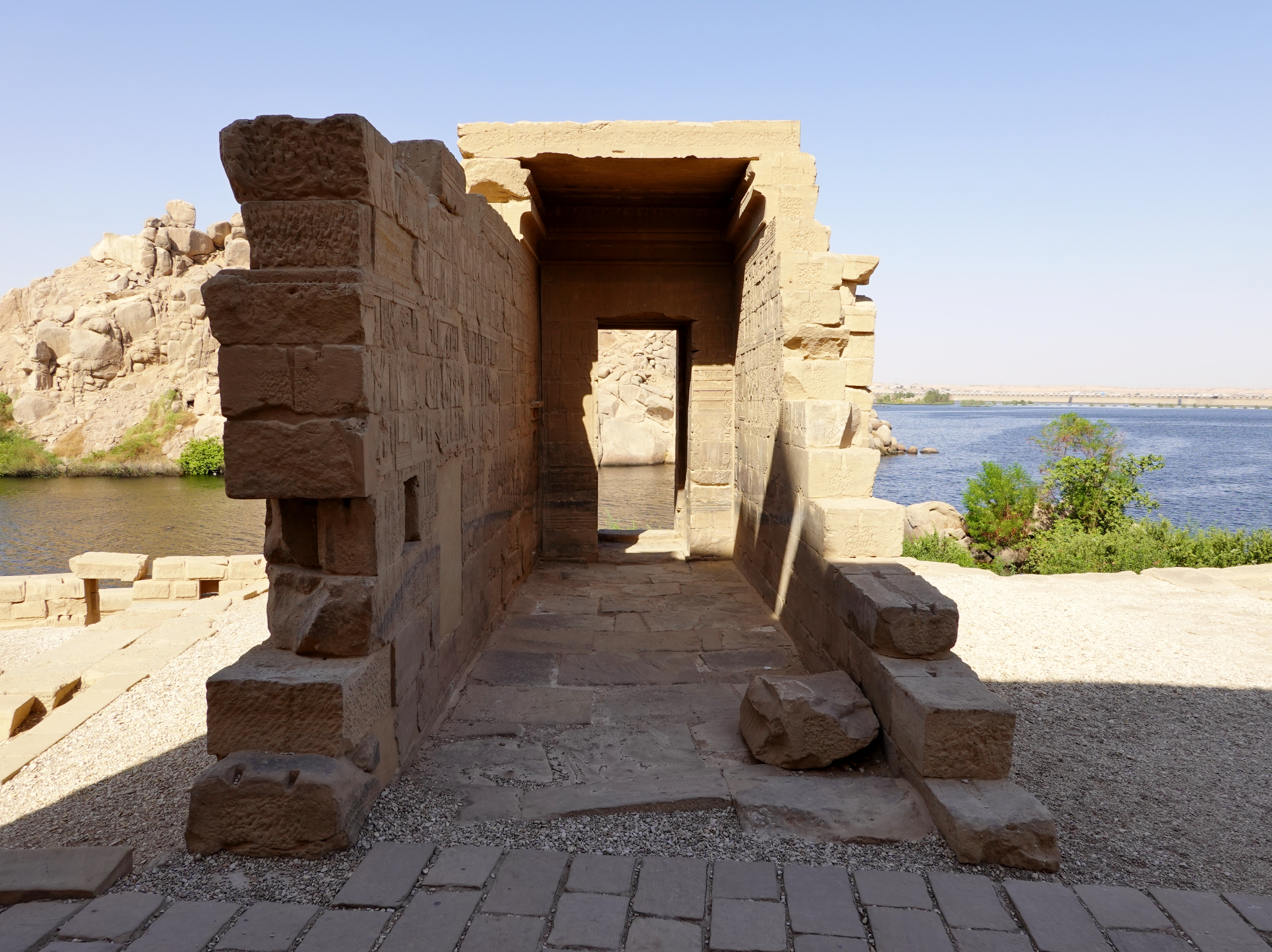 Tor des Hadrian auf der Insel Agilkia, ehemals auf der Insel Philae, Ägypten